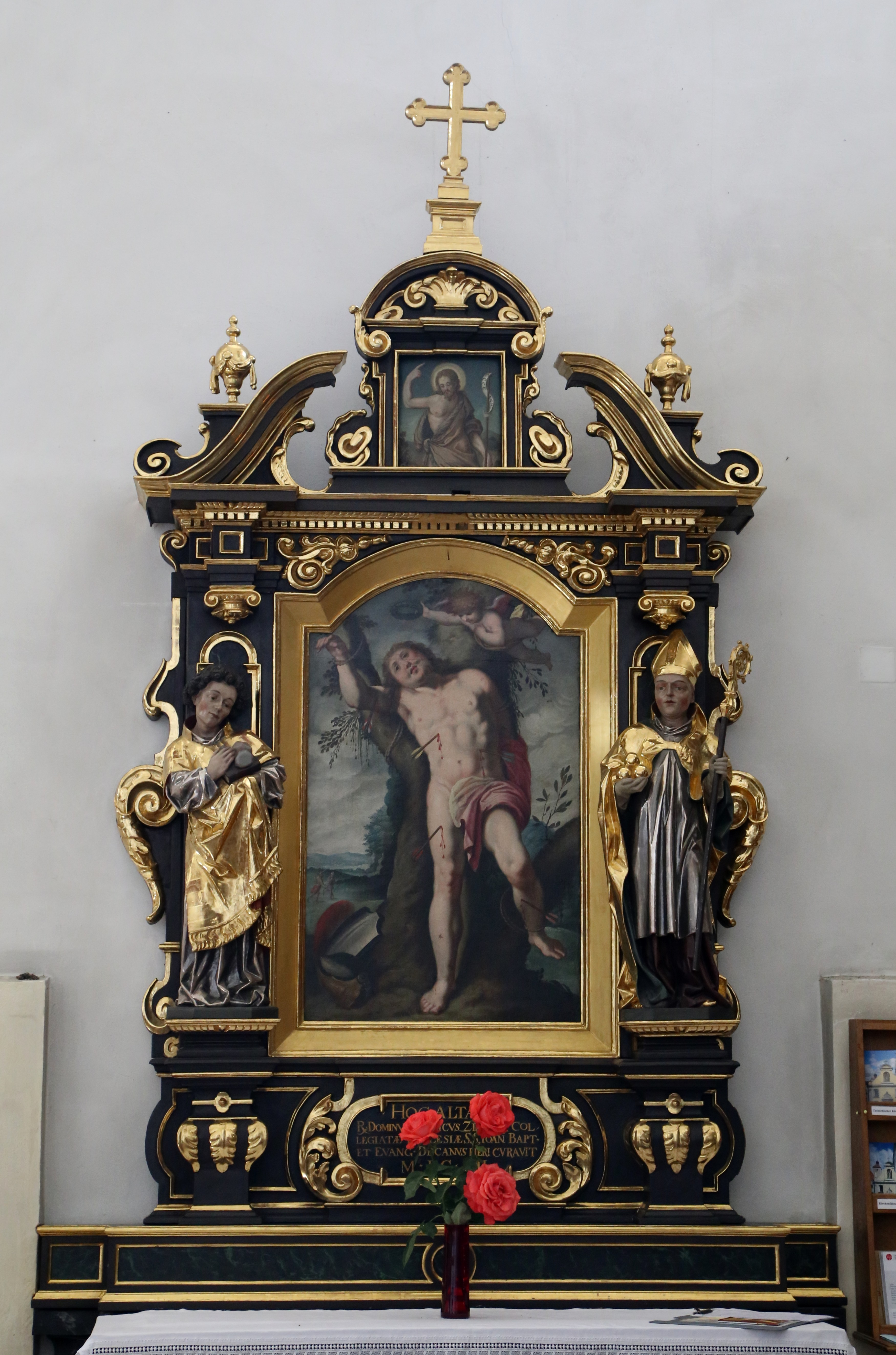 Krauterermarkt 5; Katholische Stiftskirche St. Johann, Saalbau mit eingezogenem Chor und nördlichem Chorflankenturm, Giebelfassade und Werksteingliederungen, im Kern von 1380/81, Langhaus 1766/69 weitgehend erneuert, Wiederaufbau nach Brand 1887; mit Ausstattung